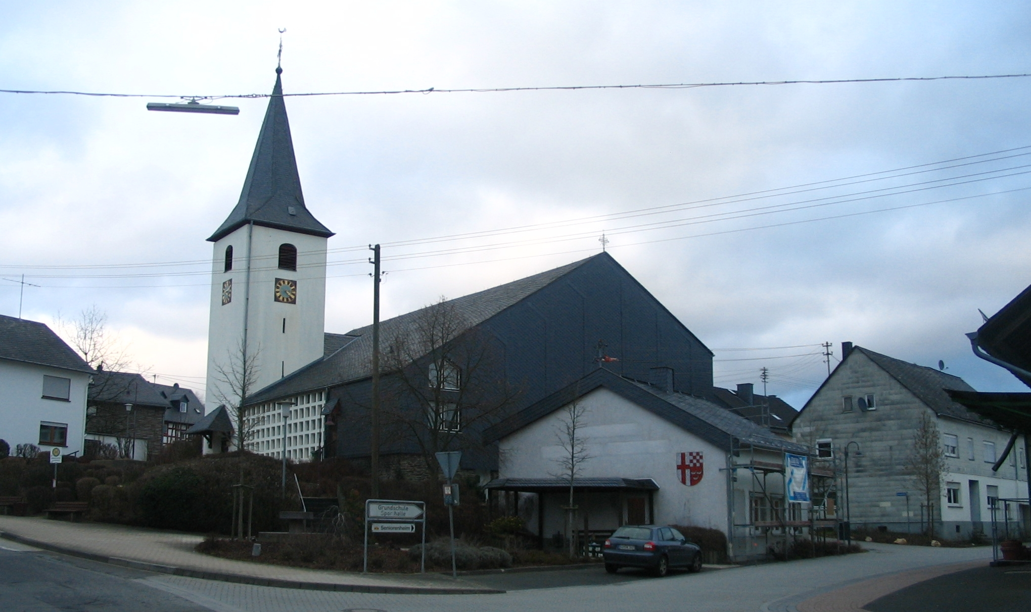 Kirche Beltheim im Hunsrück